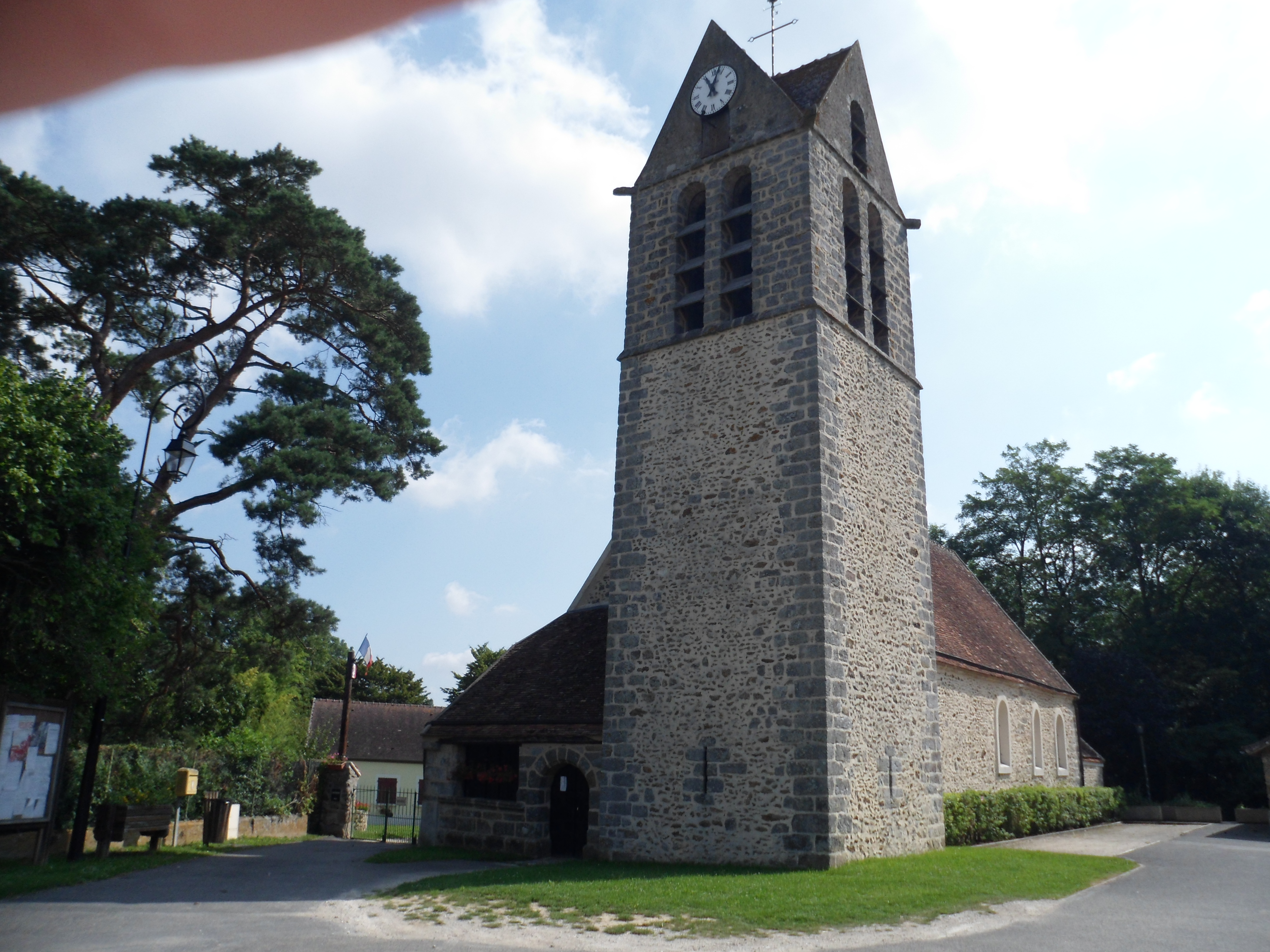 Eglise d'Argentières